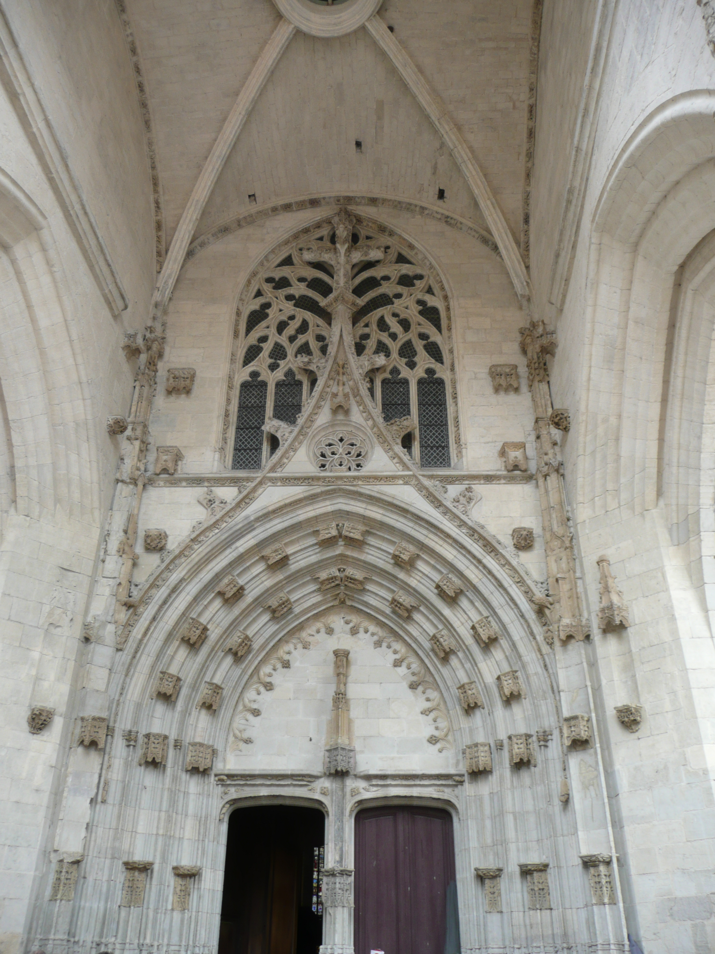 Collégiale Notre-Dame of Villefranche-de-Rouergue (view from Place Notre-Dame) Map: 44° 21' 09" N 2° 2' 16" E